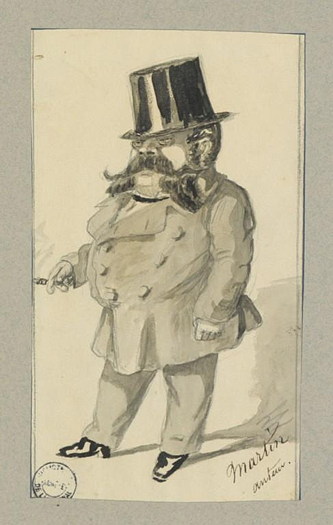 Edouard Martin : portrait / par Lhéritier